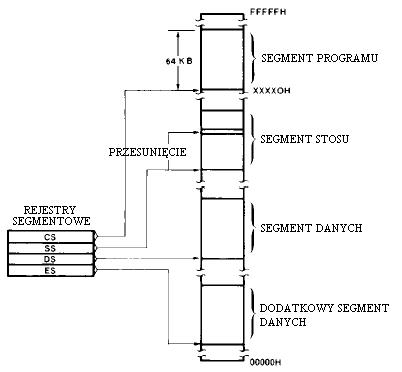 Adresowanie segmentowe